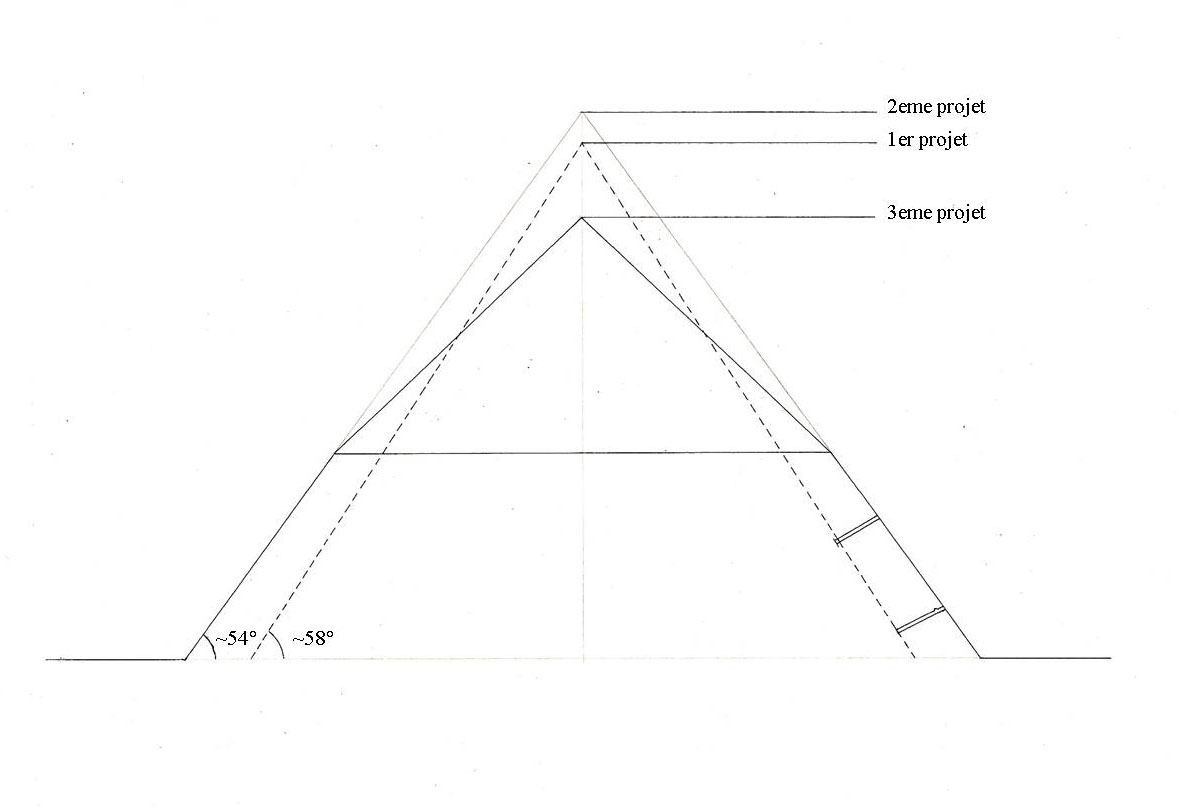 Les 3 stades de construction de la pyramide rhomboïdale à Dahchour